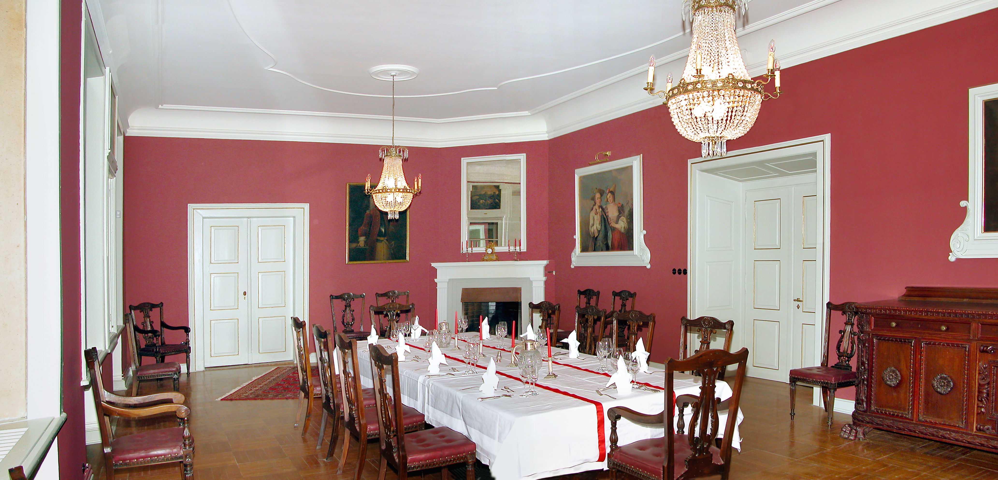 16.03.2008 02633 Gaußig: Schloß. Speisesaal im Erdgeschoß. [DSCN31956-31957.TIF]20080316545MDR.JPG(c)Blobelt